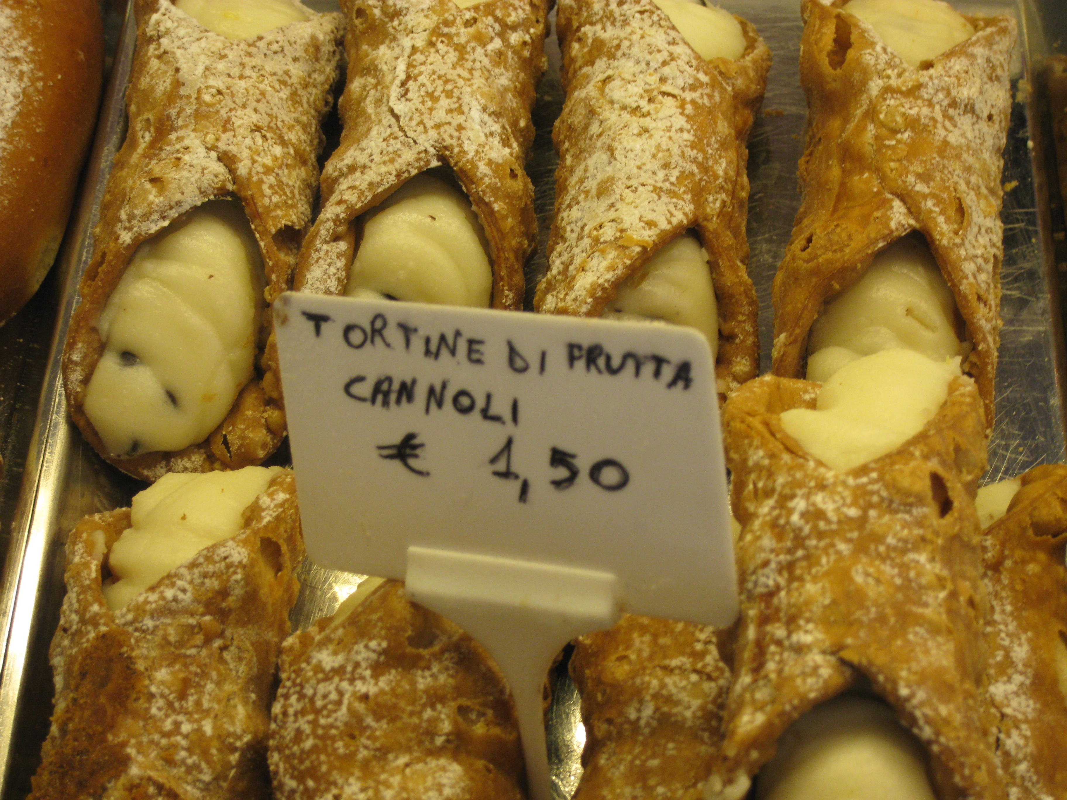 Cannoli קנולי